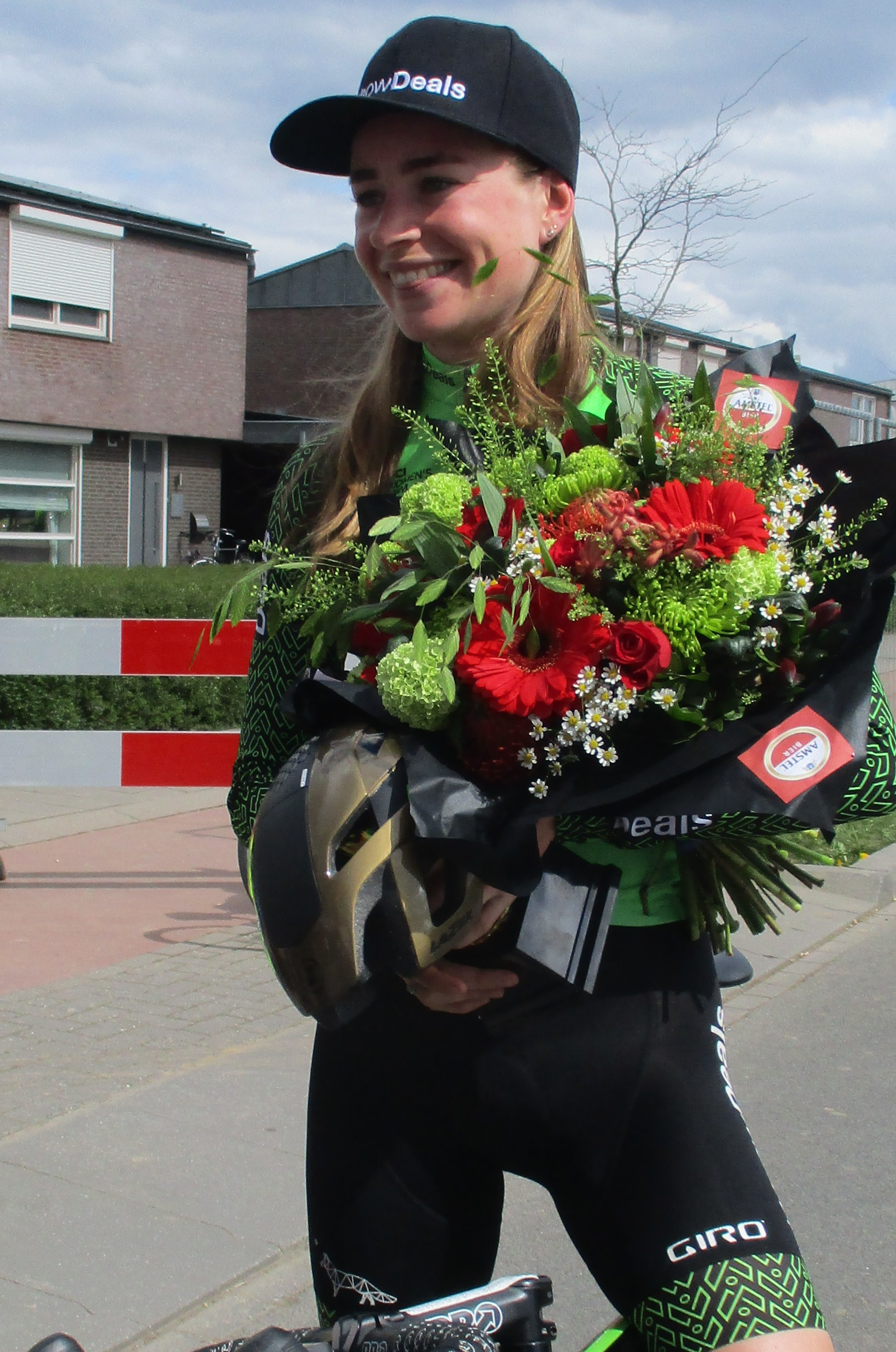 Finish van de Amstel Gold Race Ladies Edition 2018 in Berg, Valkenburg aan de Geul.